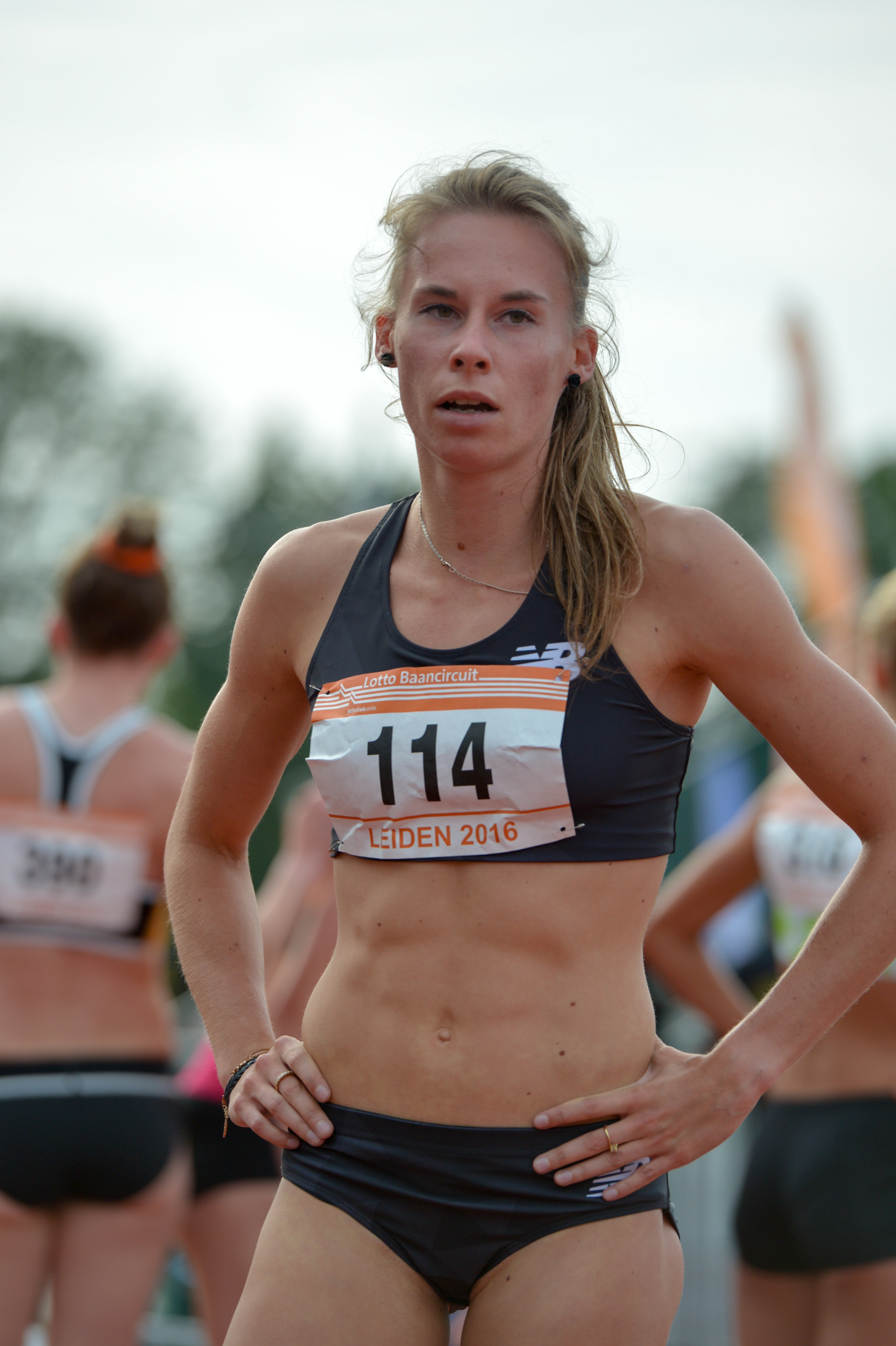 Renée Eykens hijgt uit na de 800 m tijdens de Gouden Spike 2016, Leiden